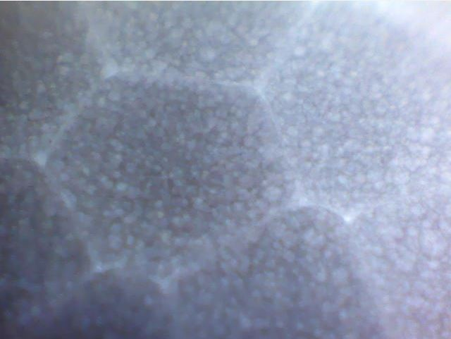 Poliestireno expandido observado con un miscroscopio.